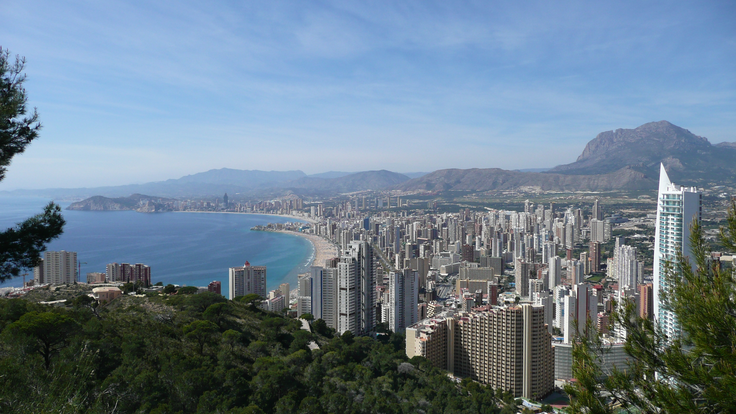 Una vista panorámica de Benidorm desde la Cruz.